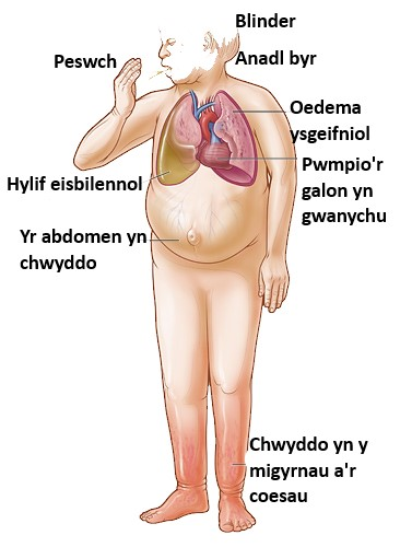 Symptomau methiant y galon